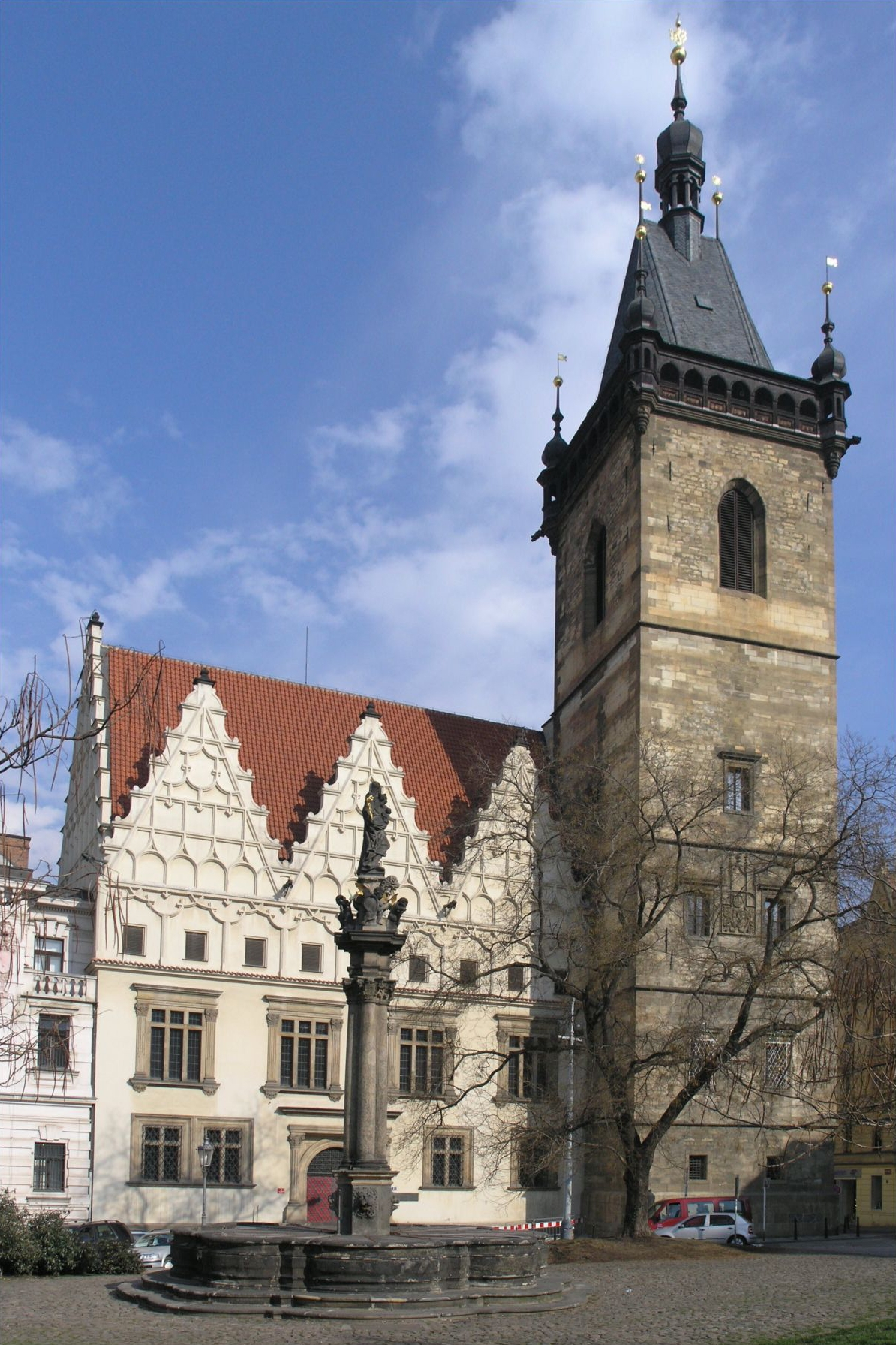 Praha, Nové Město - Novoměstská radnice